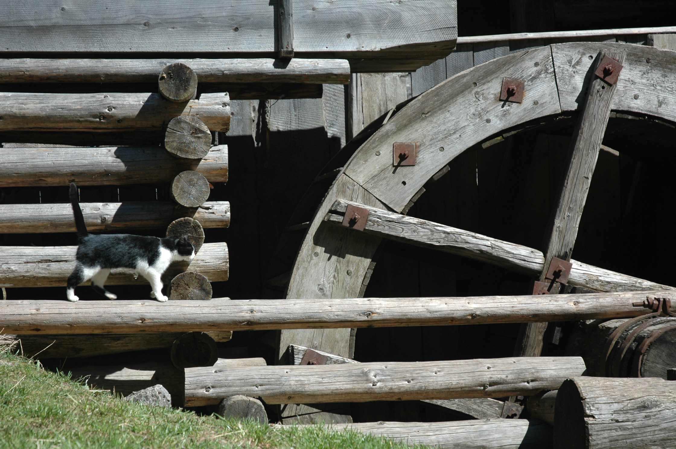 Kvačianska dolina, Oblazy, koleso horného mlynu